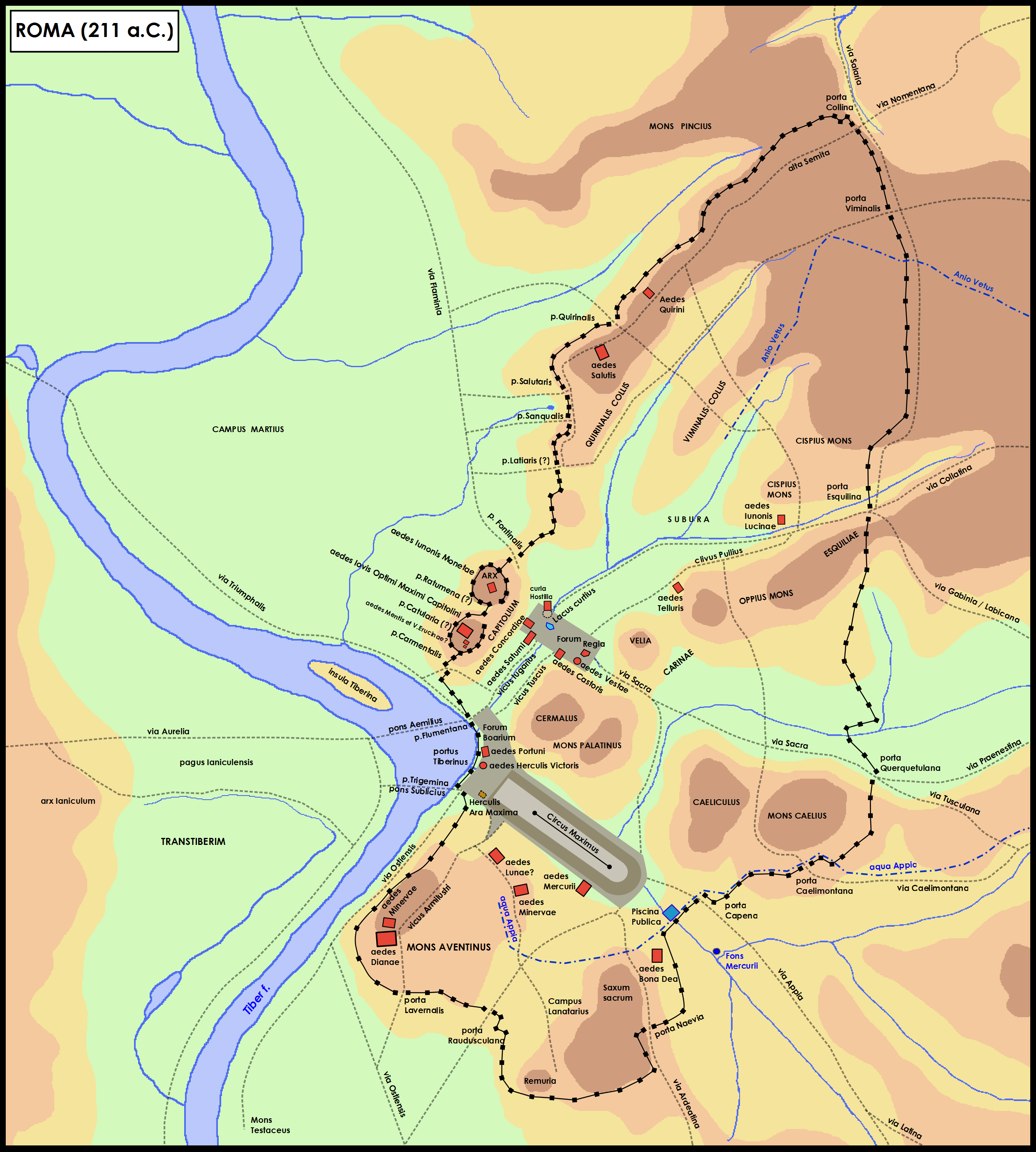 Roma nel 211 a.C. con i suoi monumenti, porte, acquedotti, ecc. Annibale pose i suoi accampamenti non molto distante da porta Collina proprio quest'anno.